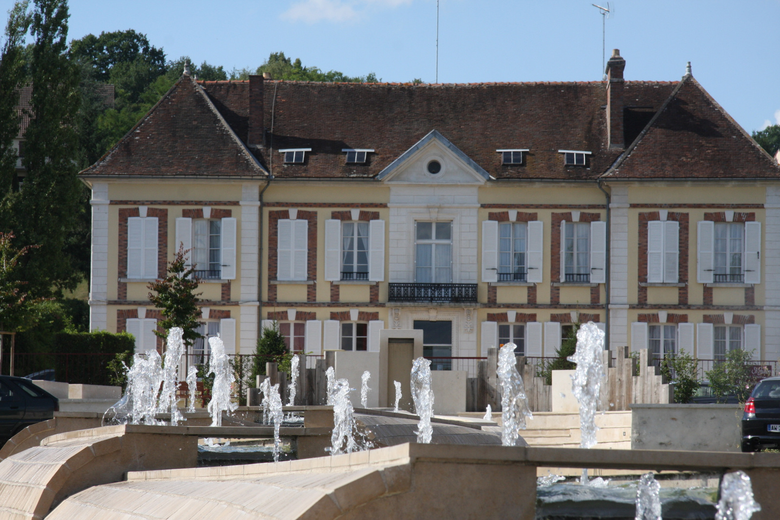 établissement pour personnes agées.